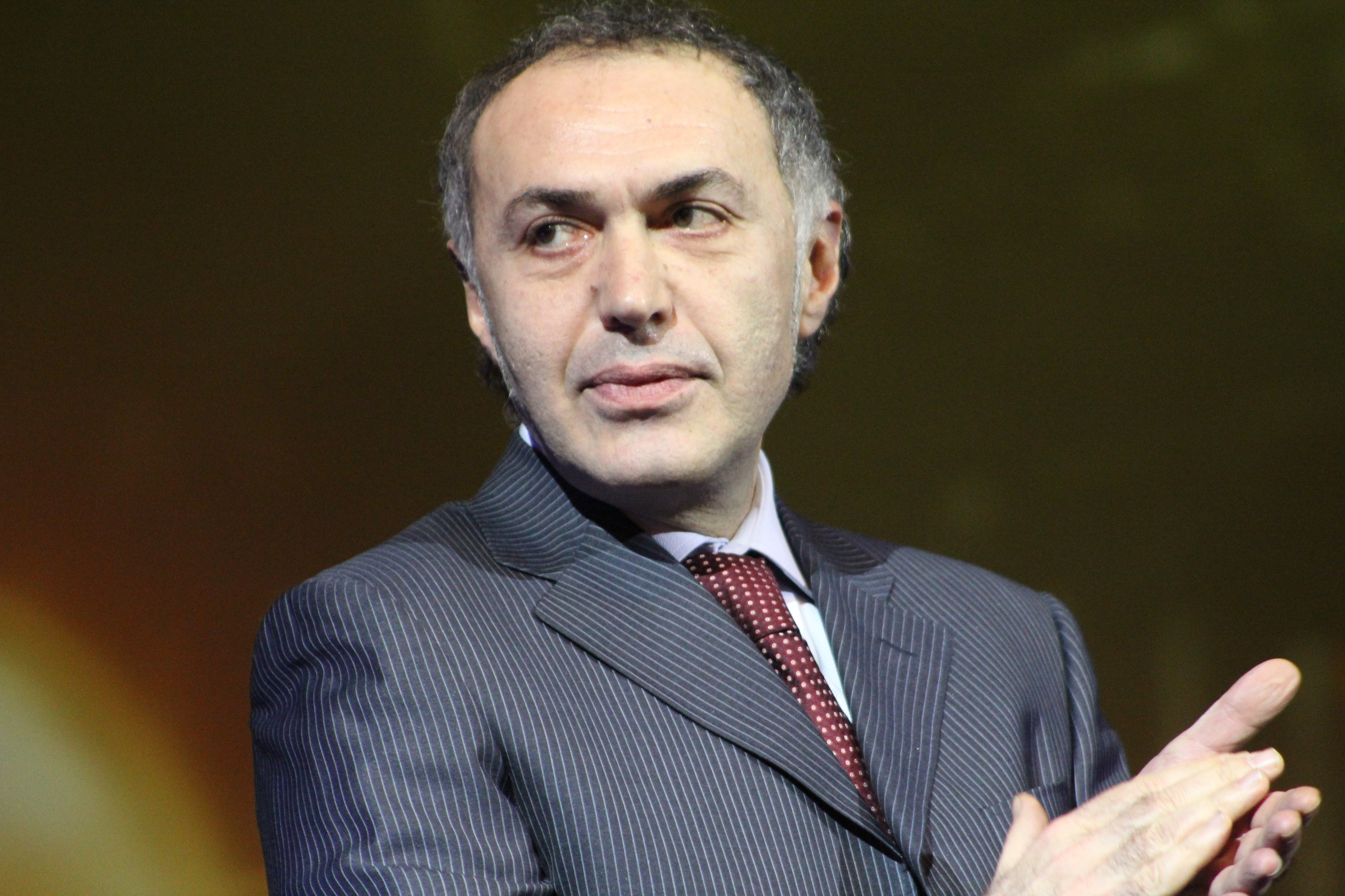 Карен Кавалерян на церемонии вручения премии "Музыкальное сердце театра", 2012